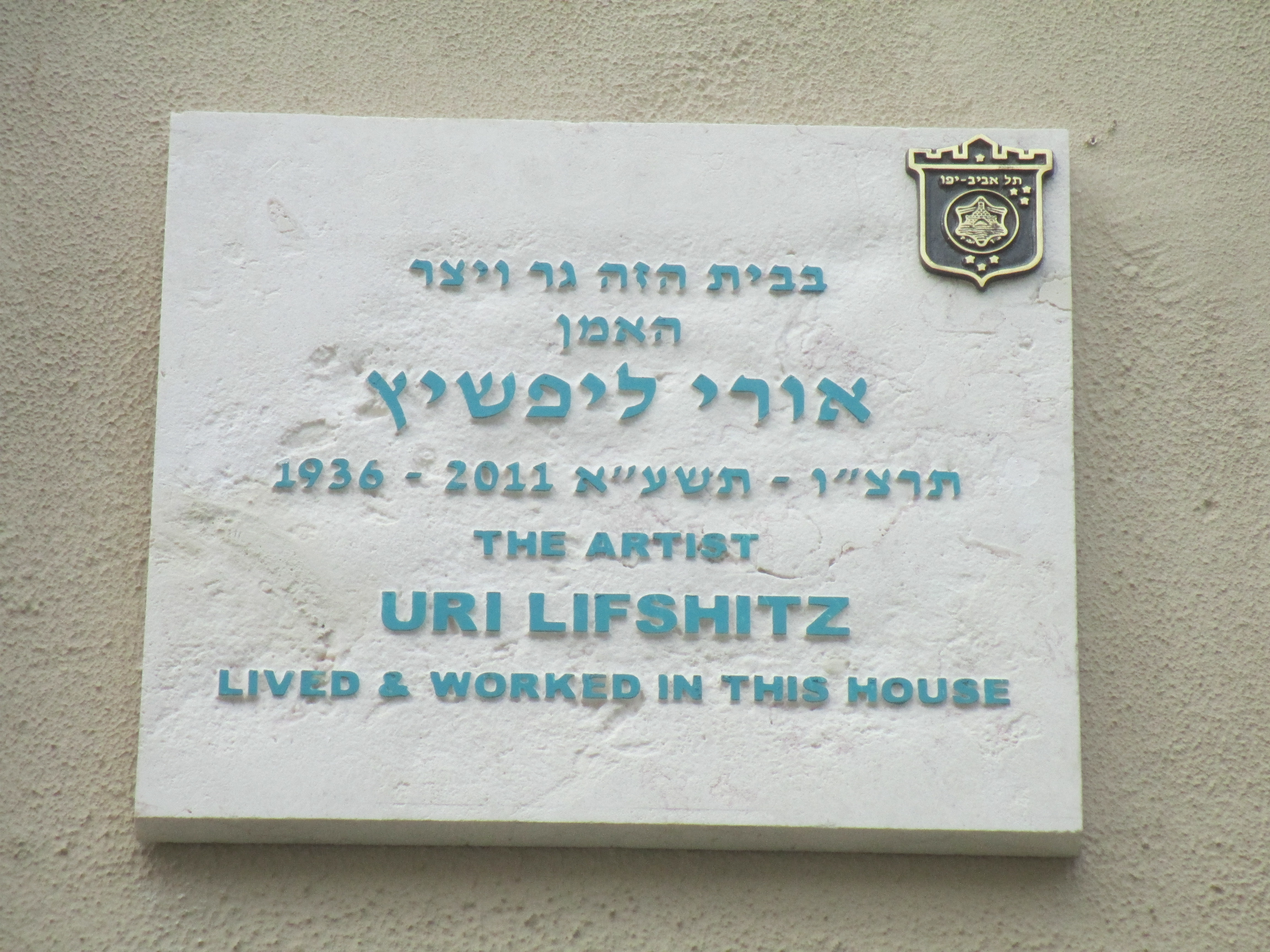 לוחית זיכרון על ביתו של הצייר אורי ליפשיץ ברחוב אמזלג 14 בשכונות נווה צדק בתל אביב